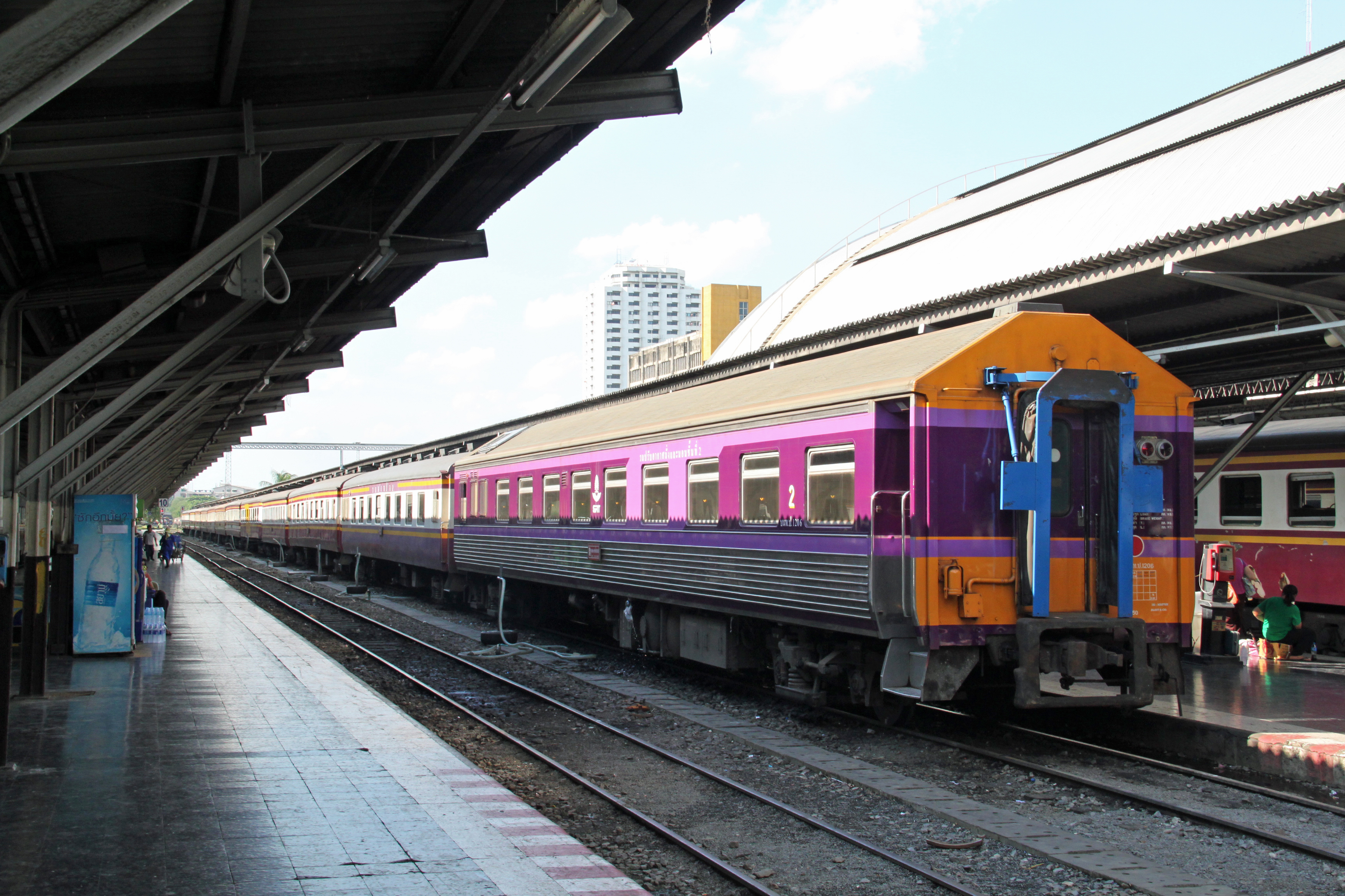 Carriage of Thailand State Railways